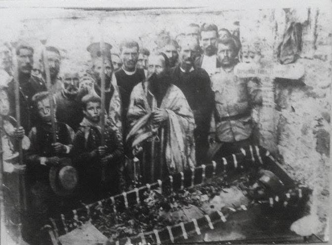 Снимка от погребението на Гоцо Петров (1874-1916)